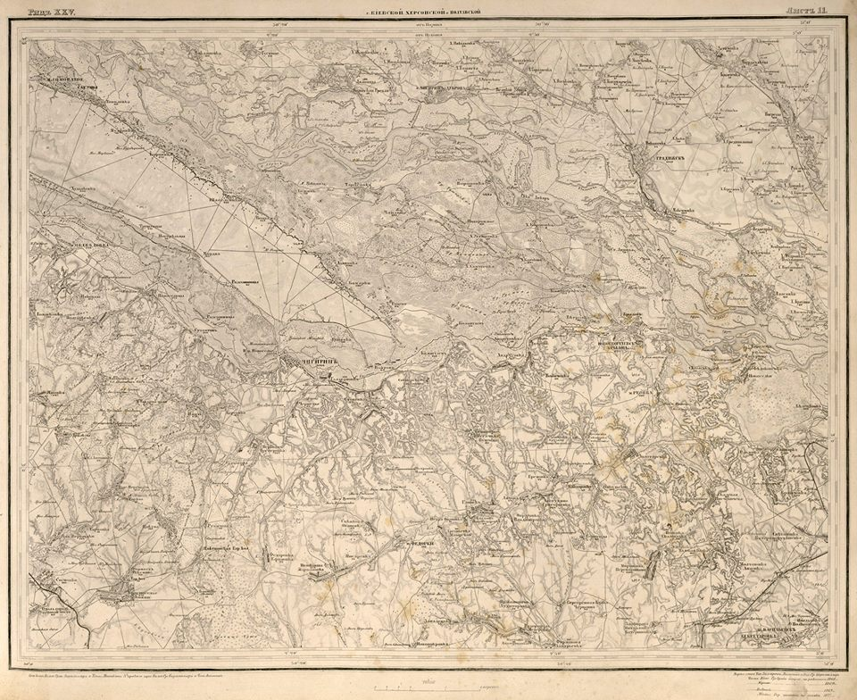 Карта Р. І.